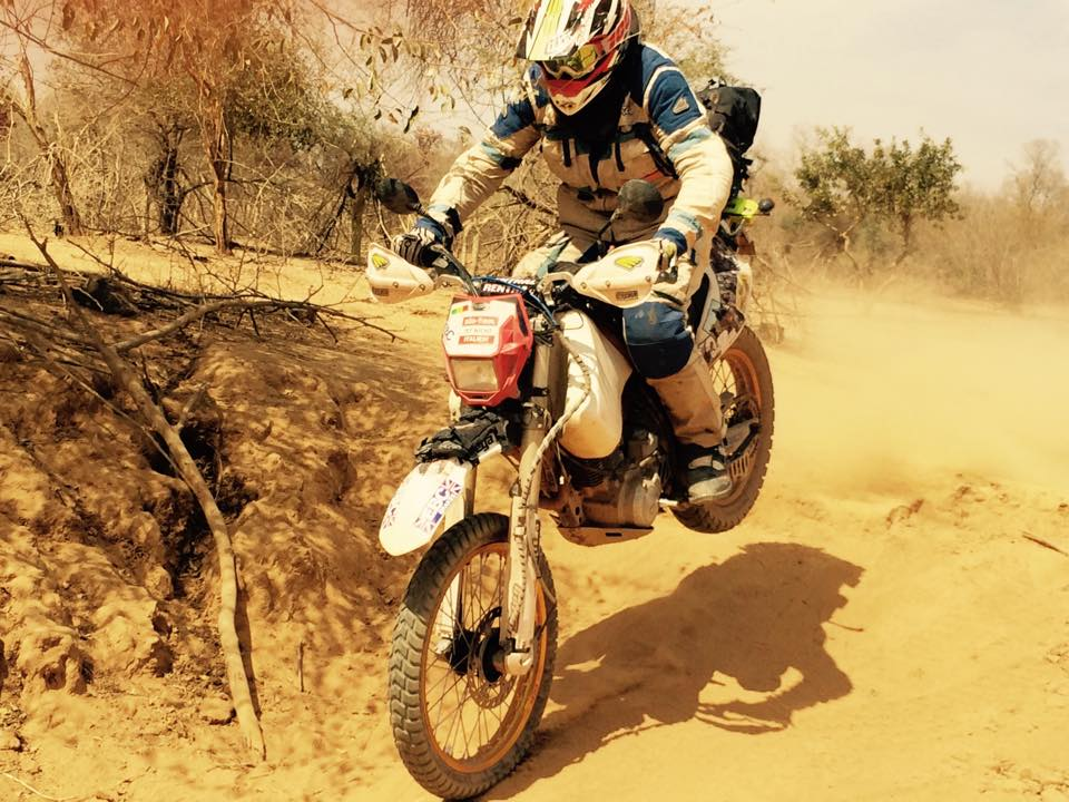 Budapest-Bamako Rally 2015